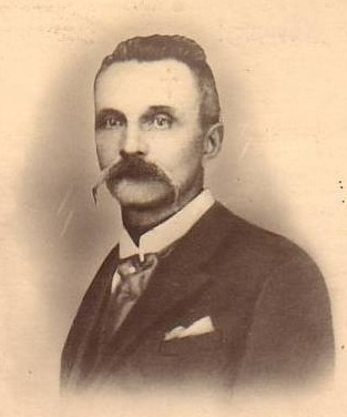 Burgemeester Vital Maeyens - Knesselare - Oost-Vlaandeeren - België